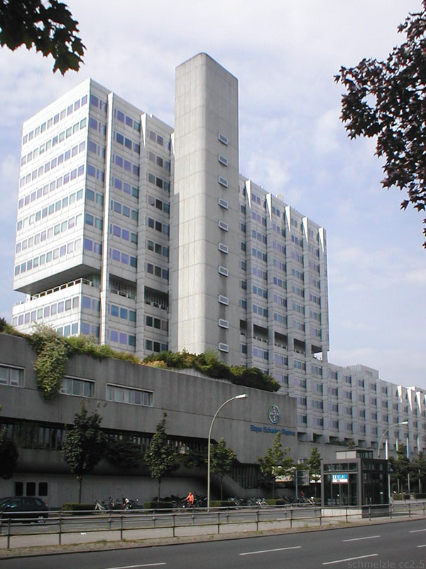 Hauptverwaltung der Bayer Schering Pharma in Berlin-Wedding